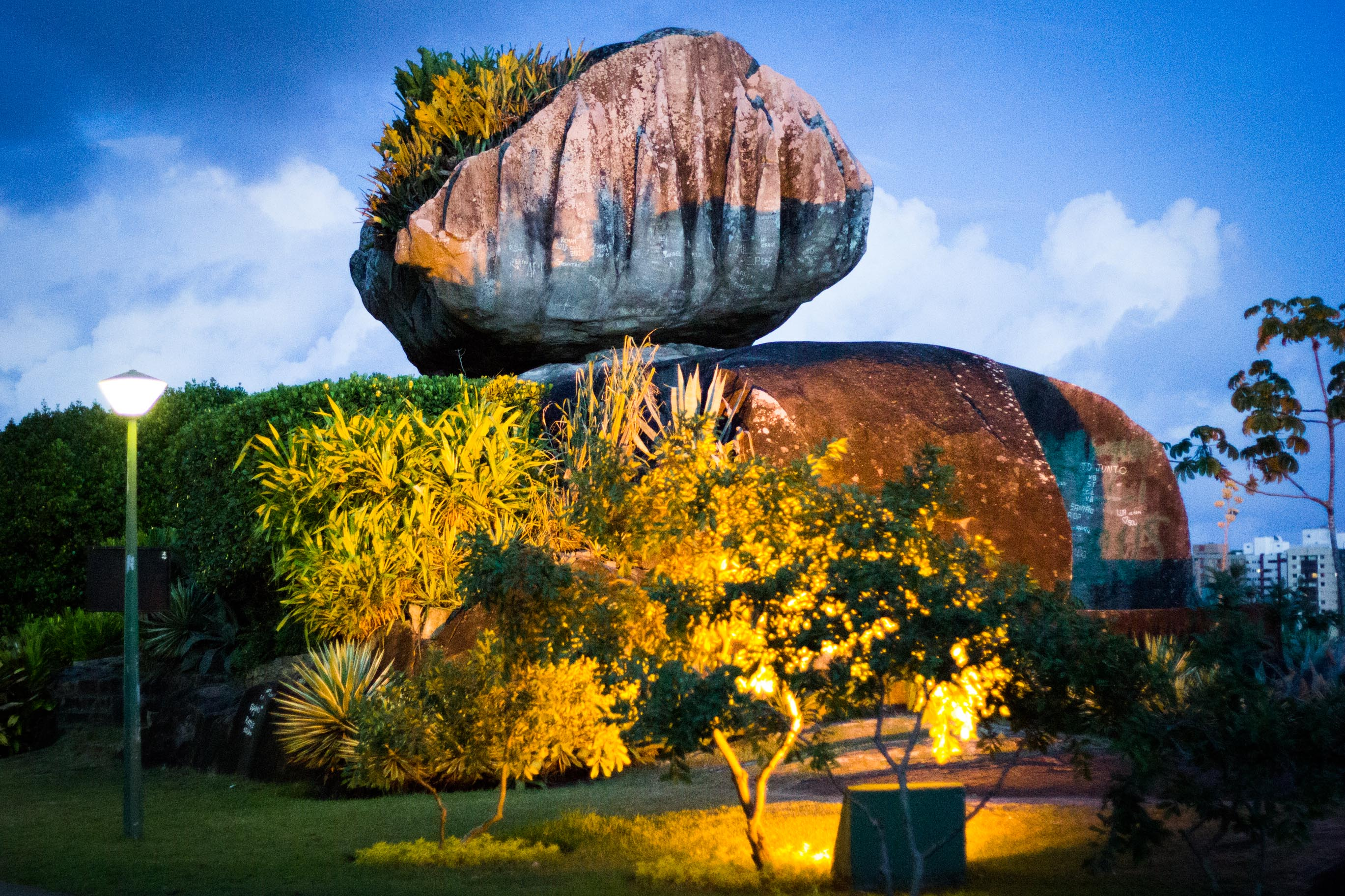 Parque Pedra da Cebola localizado em Vitória-ES, Brasil